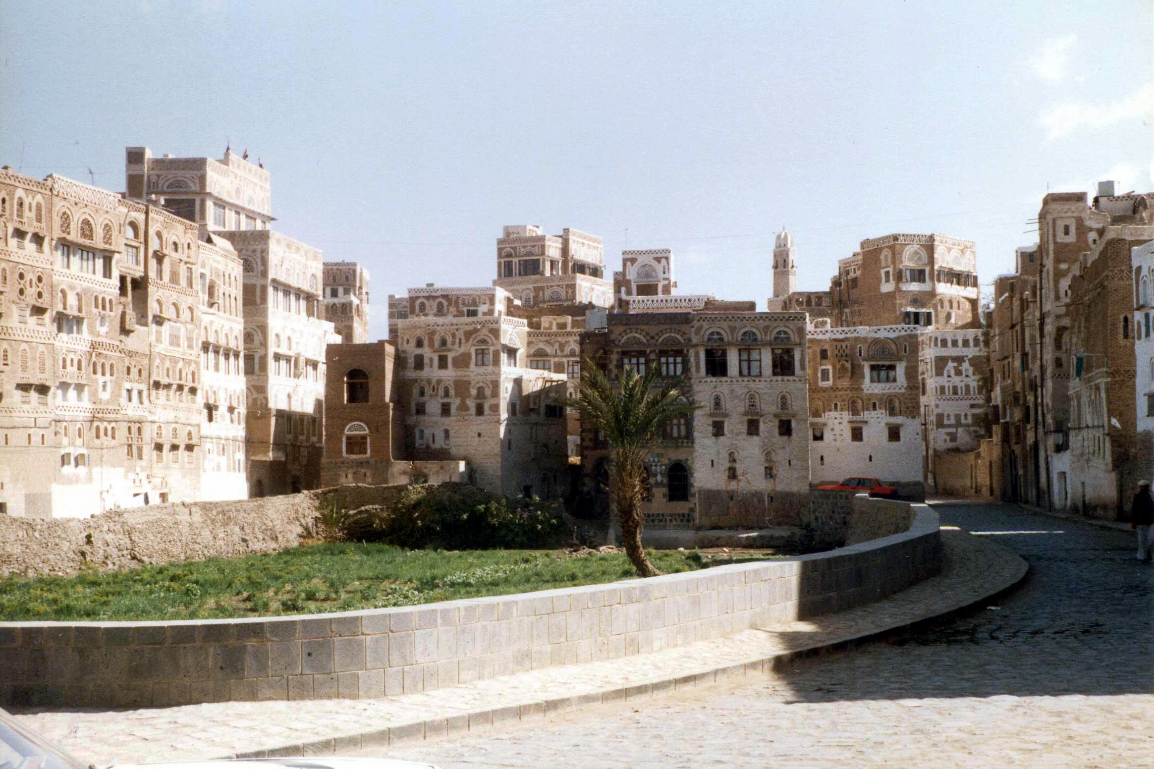 Sana'a